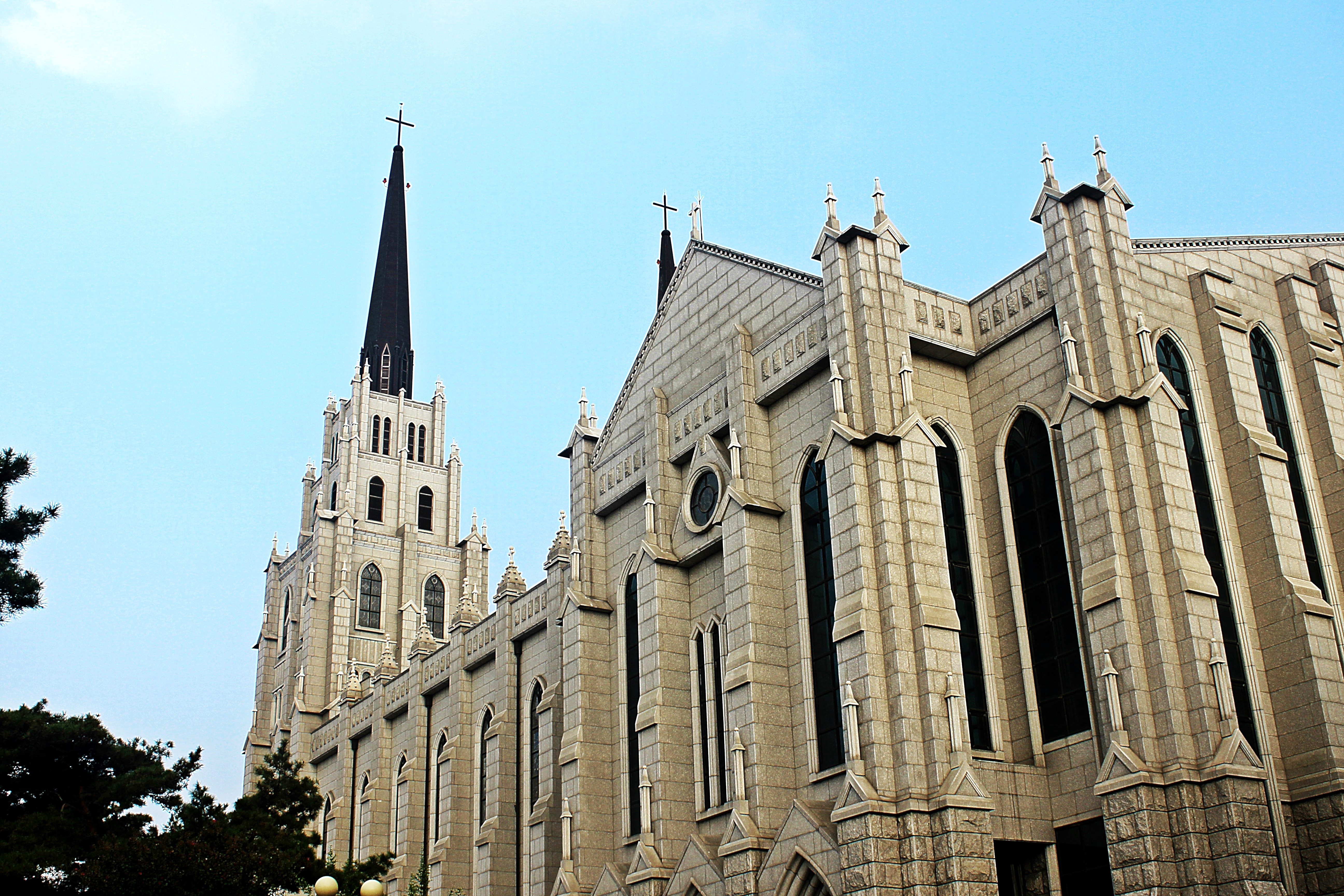 대구제일교회(3)